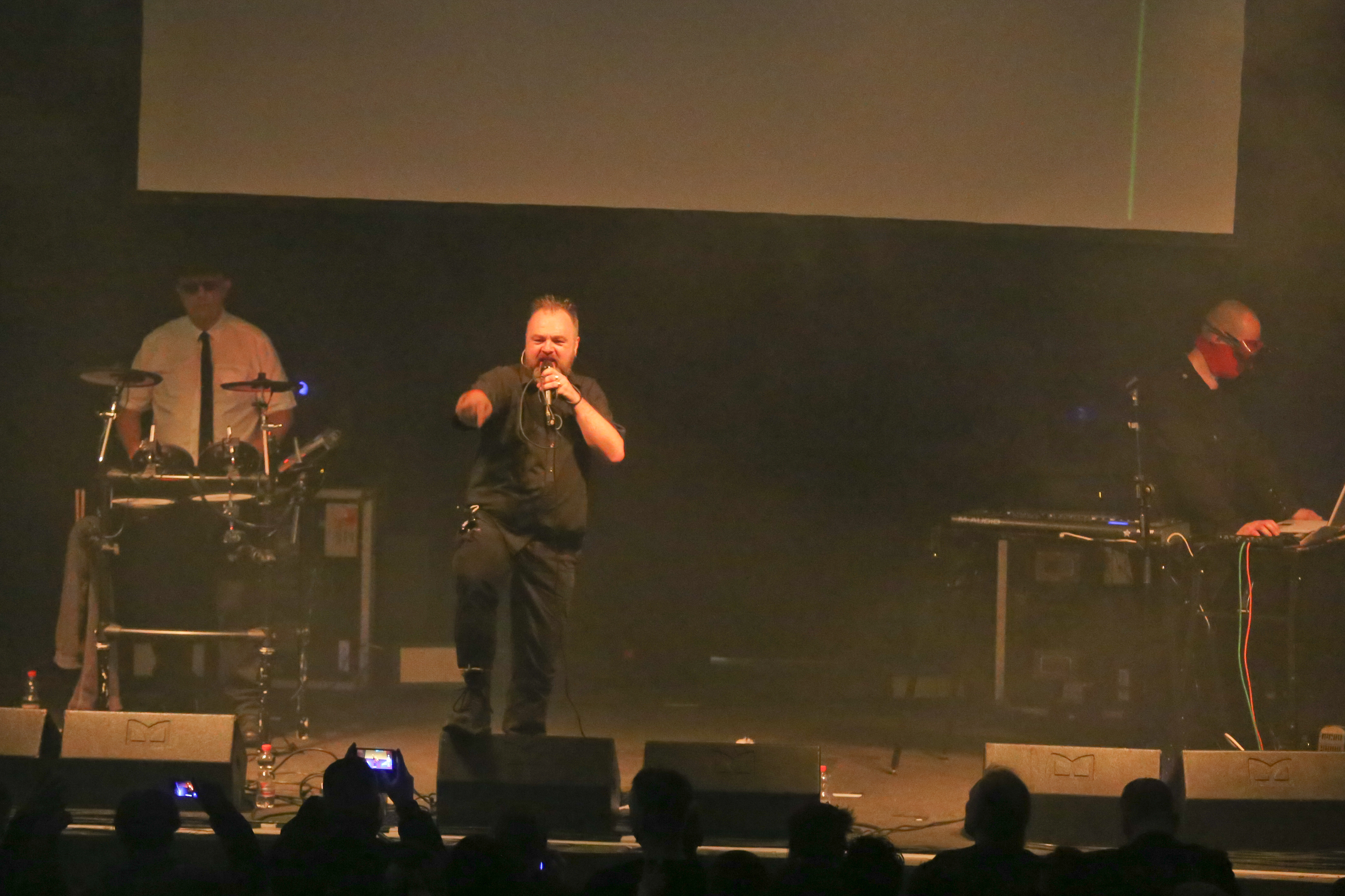 Die Band Signal Aout 42 auf dem Wave-Gotik-Treffen 2016 im Stadtbad in Leipzig.